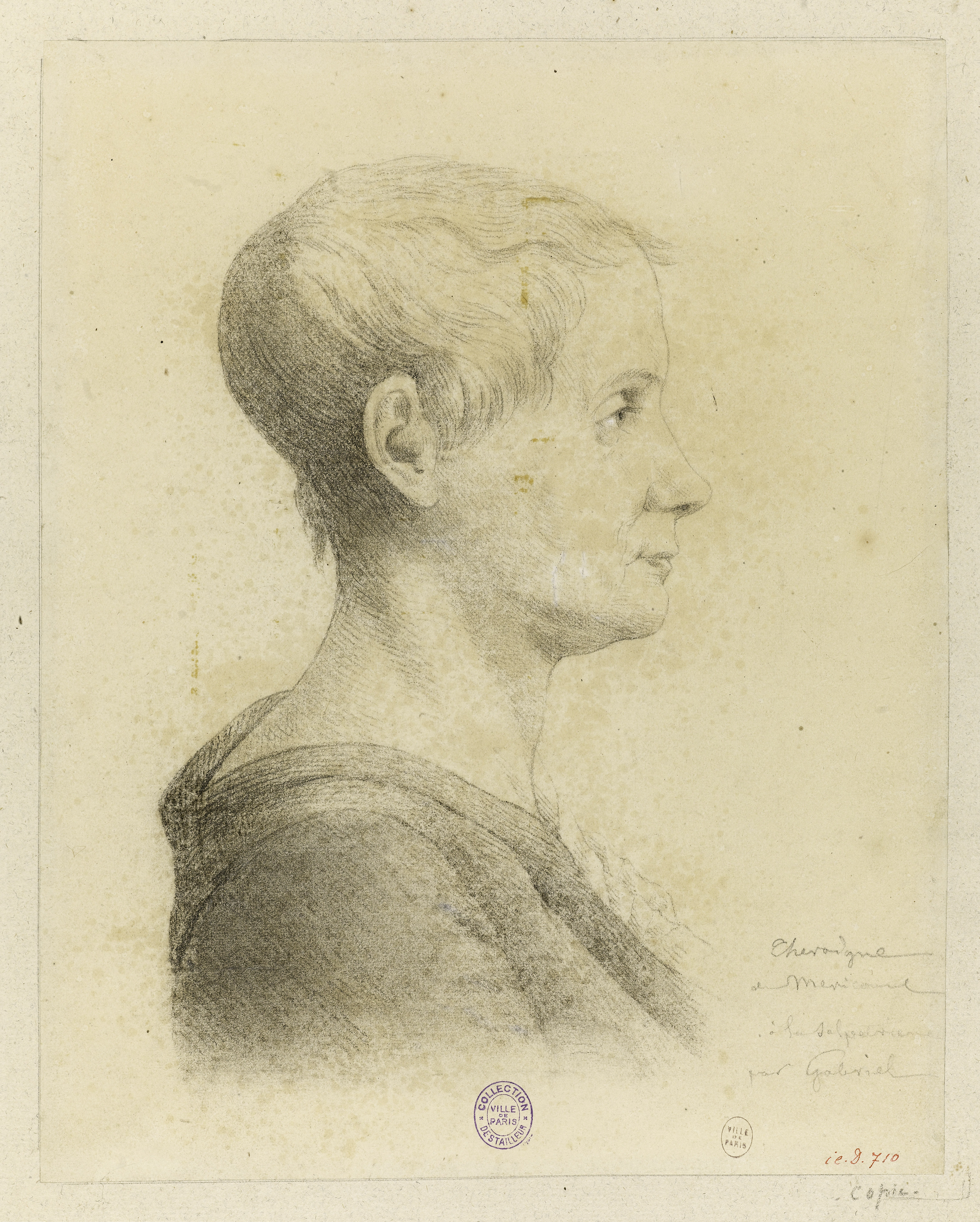 Croquis d'après nature de Théroigne de Méricourt à la Salpêtrière en 1816, réalisé par Georges François Marie Gabriel à la demande du médecin Jean-Étienne Esquirol.